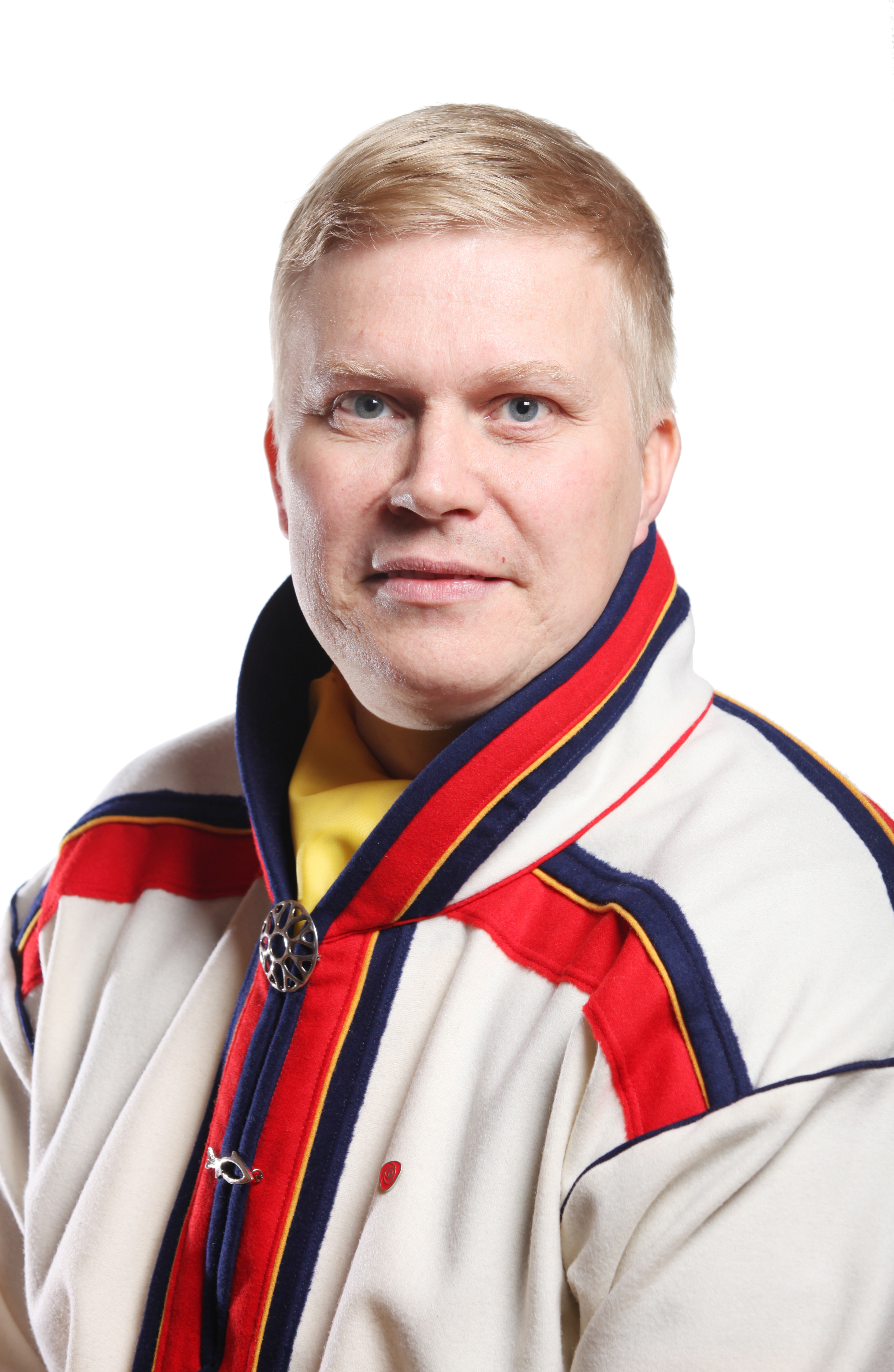 Nestleder i plan- og finanskomitéen. Foto: Kenneth Hætta / Sametinget.